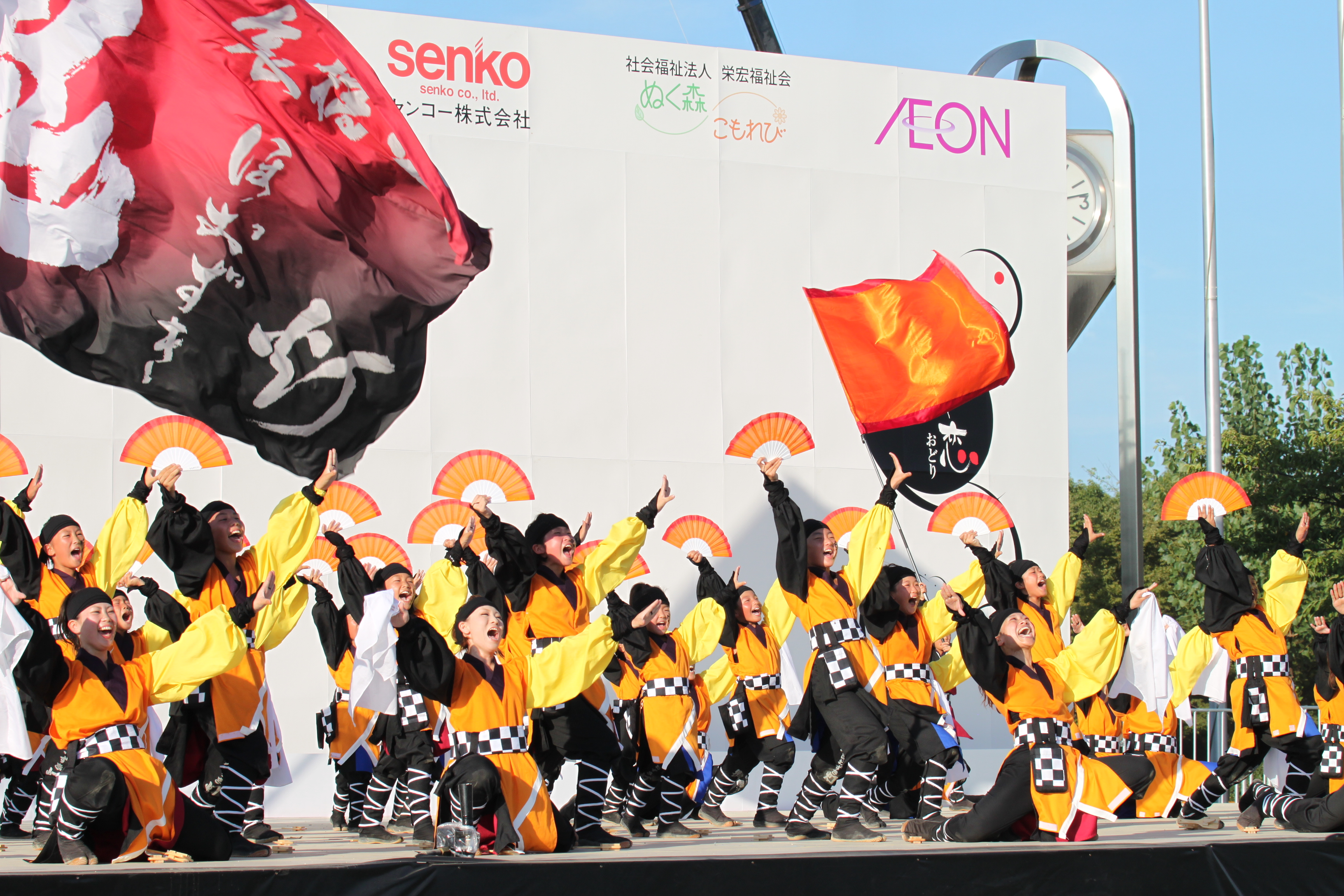 小野まつりでのおの恋おどり（よさこい）